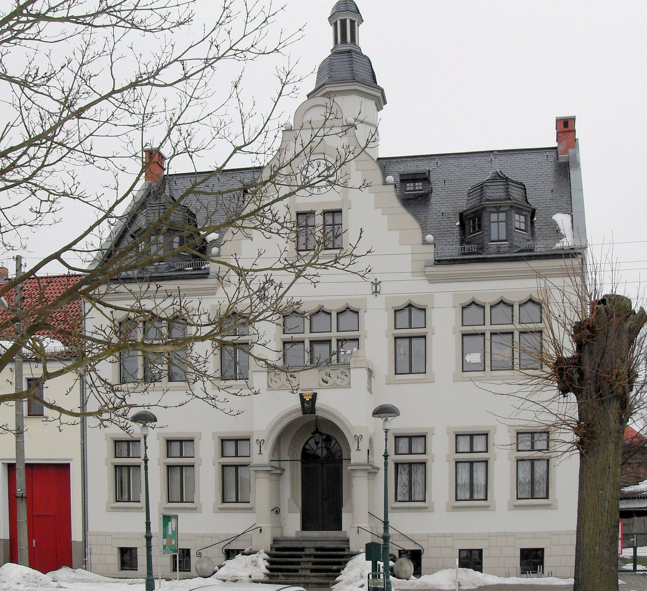 Rathaus in Vierraden, Stadt Schwedt/Oder, Deutschland